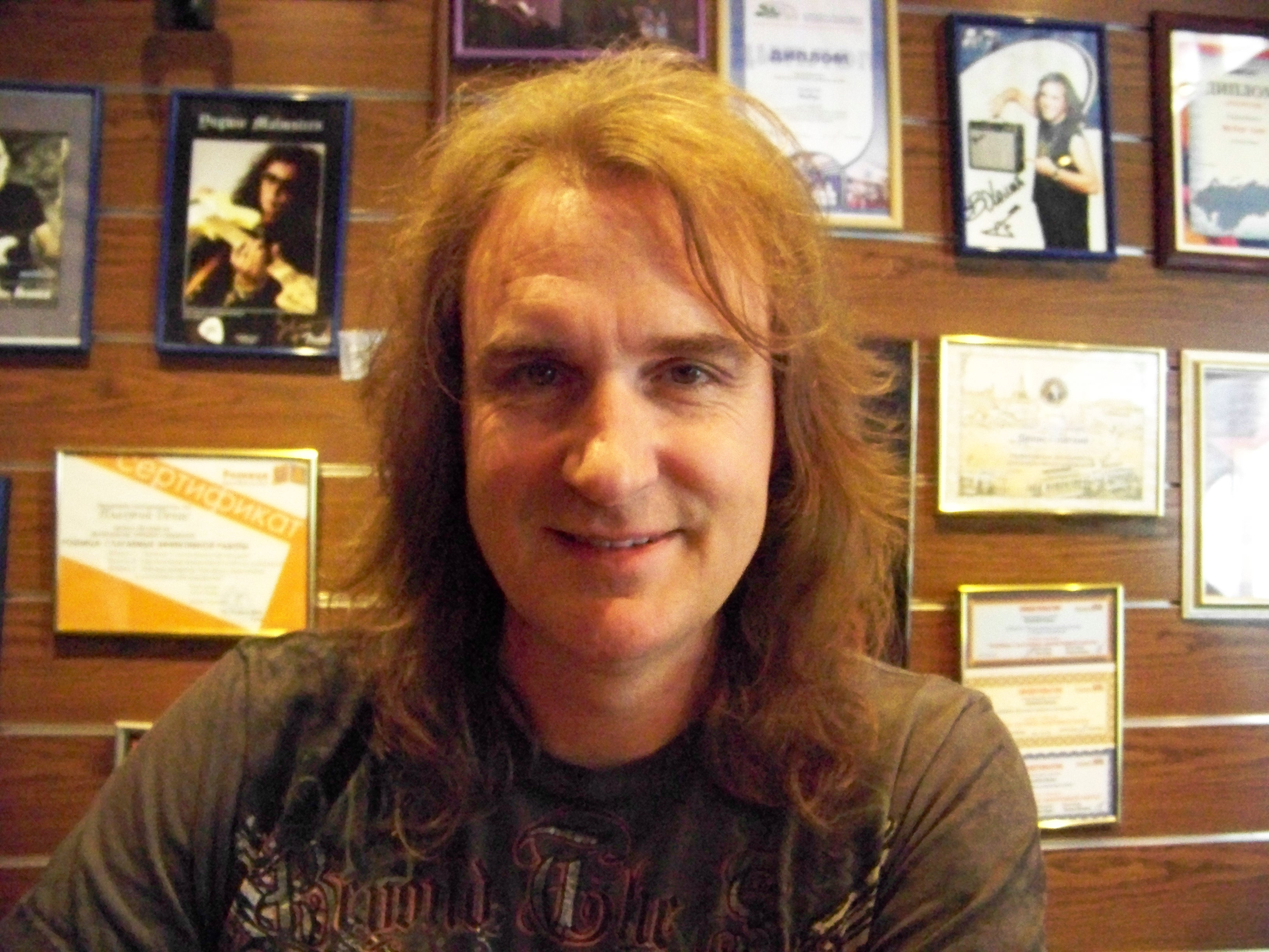 Фото Дэвида Эллефсон из Megadeth. Март 2011, Киев, автограф-сессия.